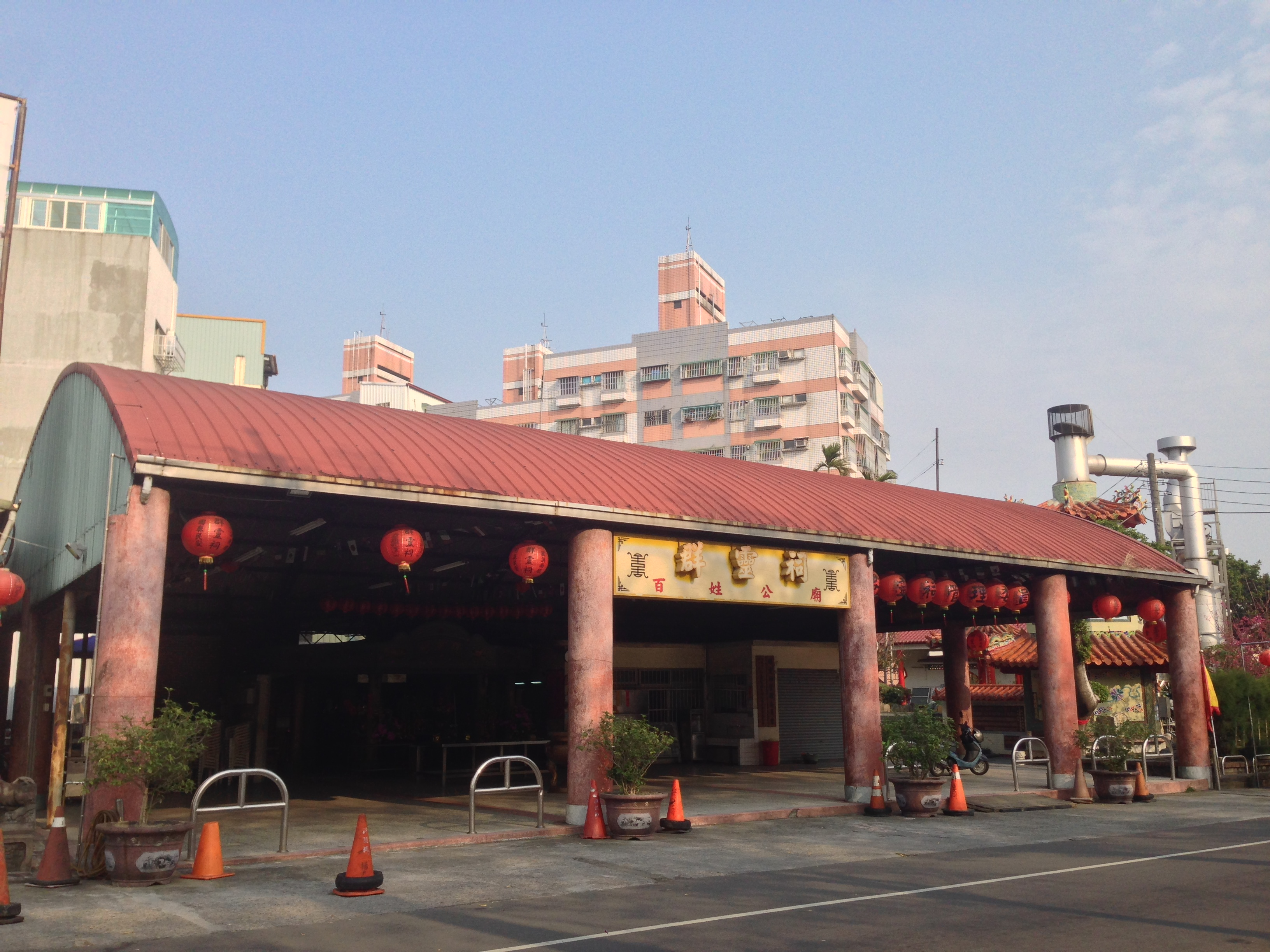 群靈祠外部